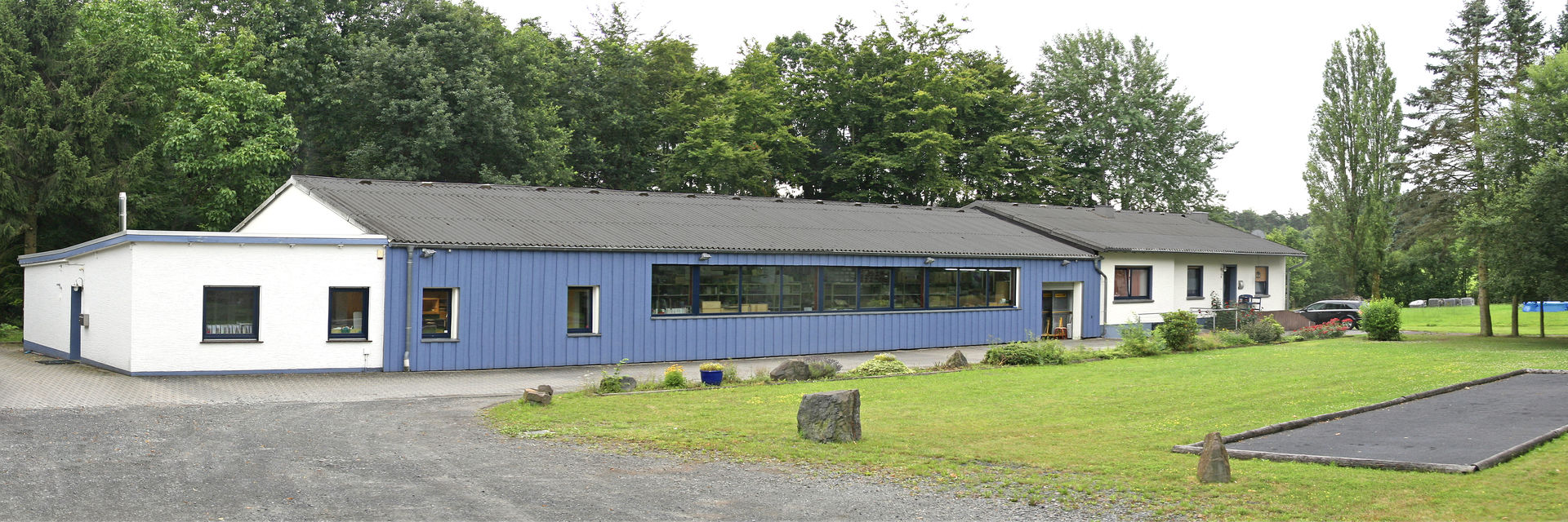 Außenansicht der Verlag am Birnbach - Bücher direkt GmbH